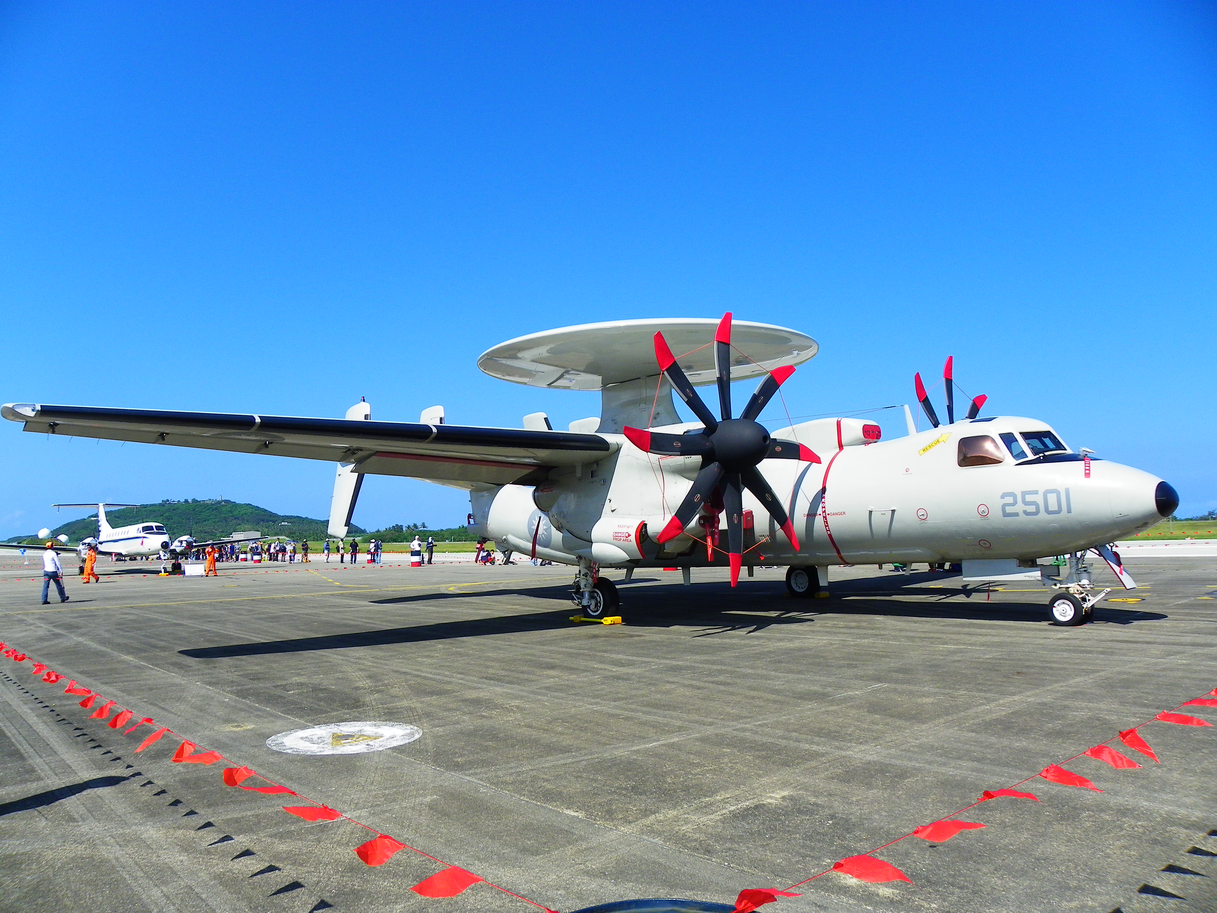 2013年空軍志航基地營區開放活動，停機坪靜態展示的E-2T 2501早期預警機。